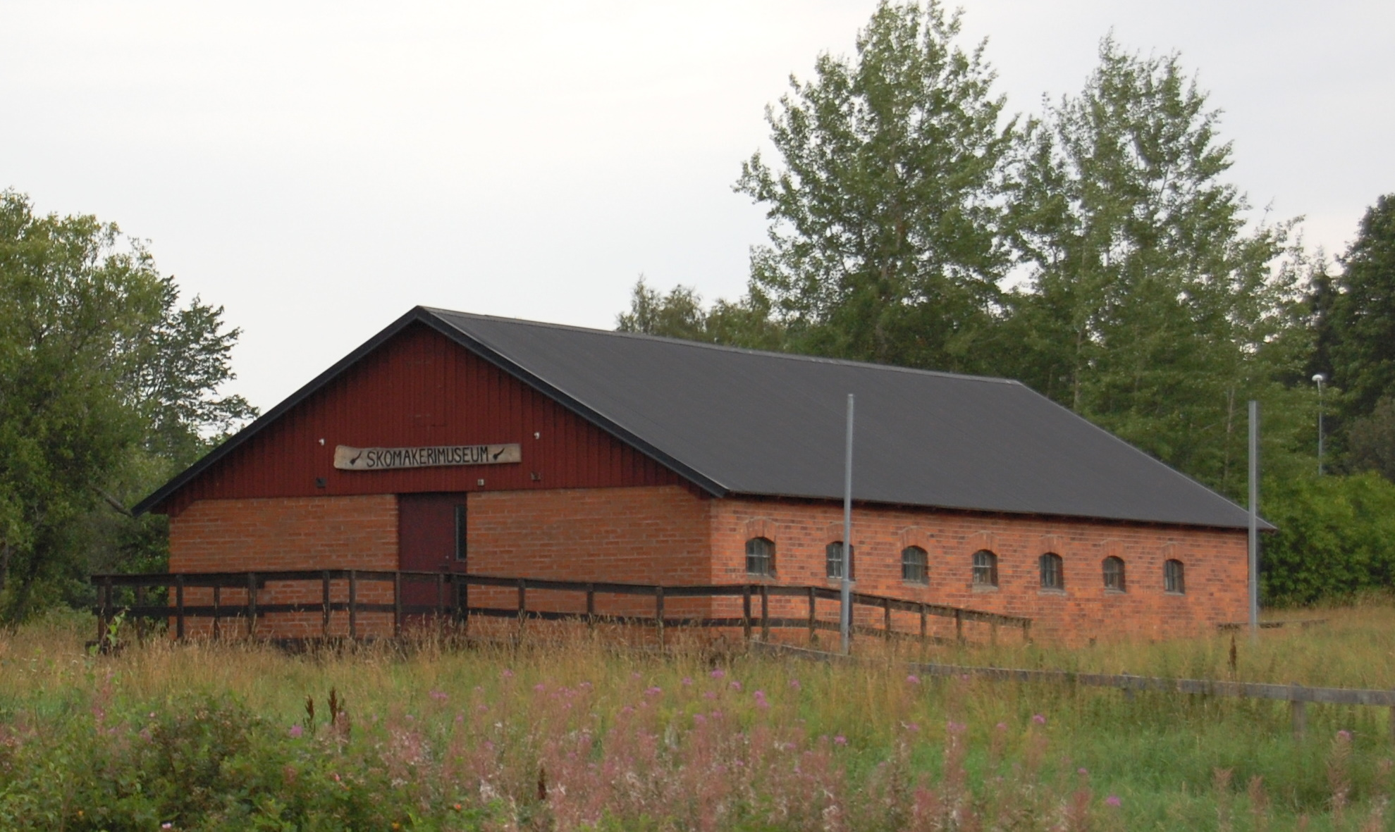 Skomakarmuseum Sävsjö